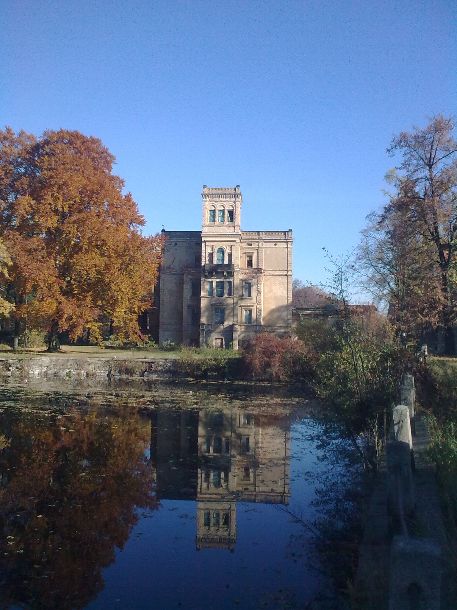 Mrowiny, ul. Zamkowa - pałac, XVII, 1870